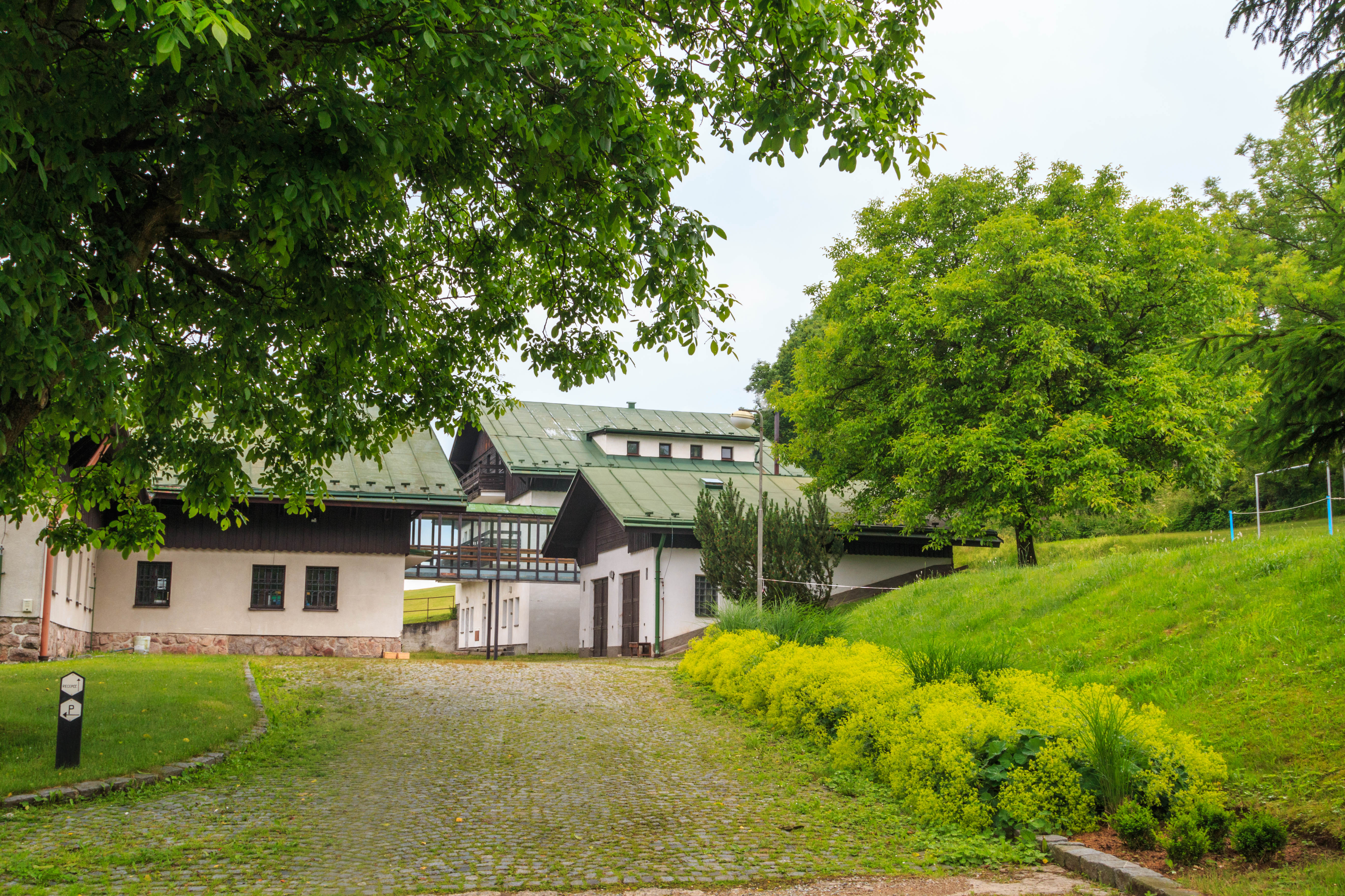 Dlouhé u Nového Hrádku - penzion